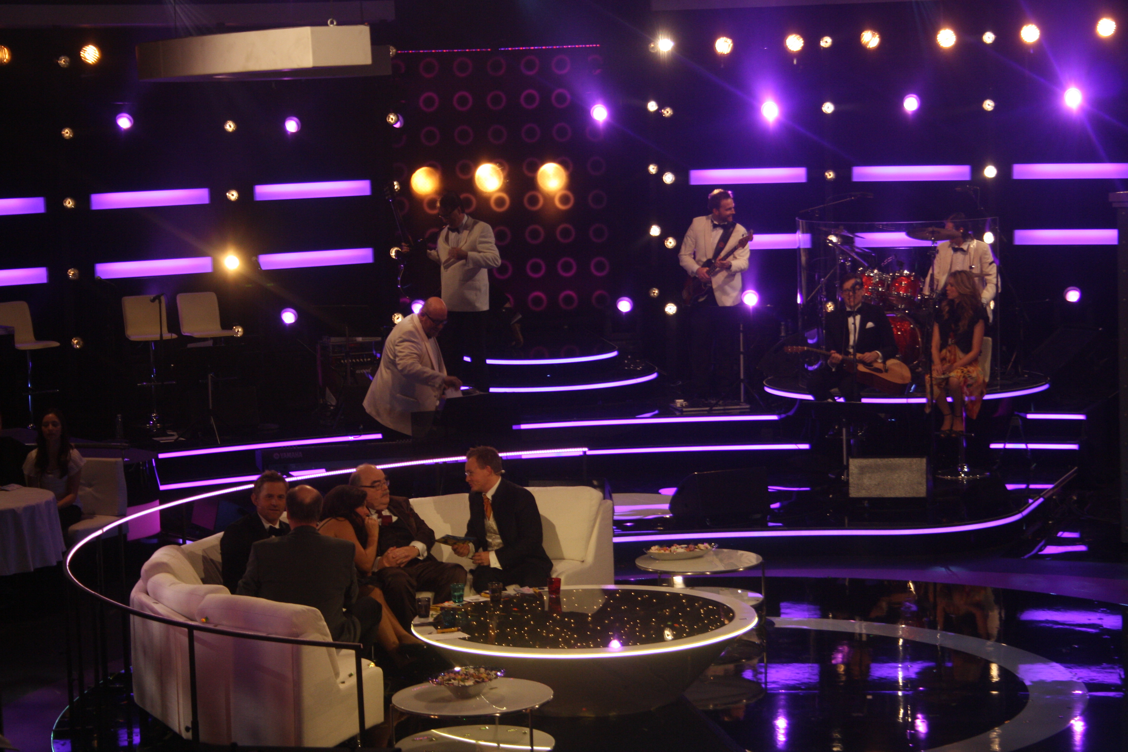 Bingolotto firar 20 år